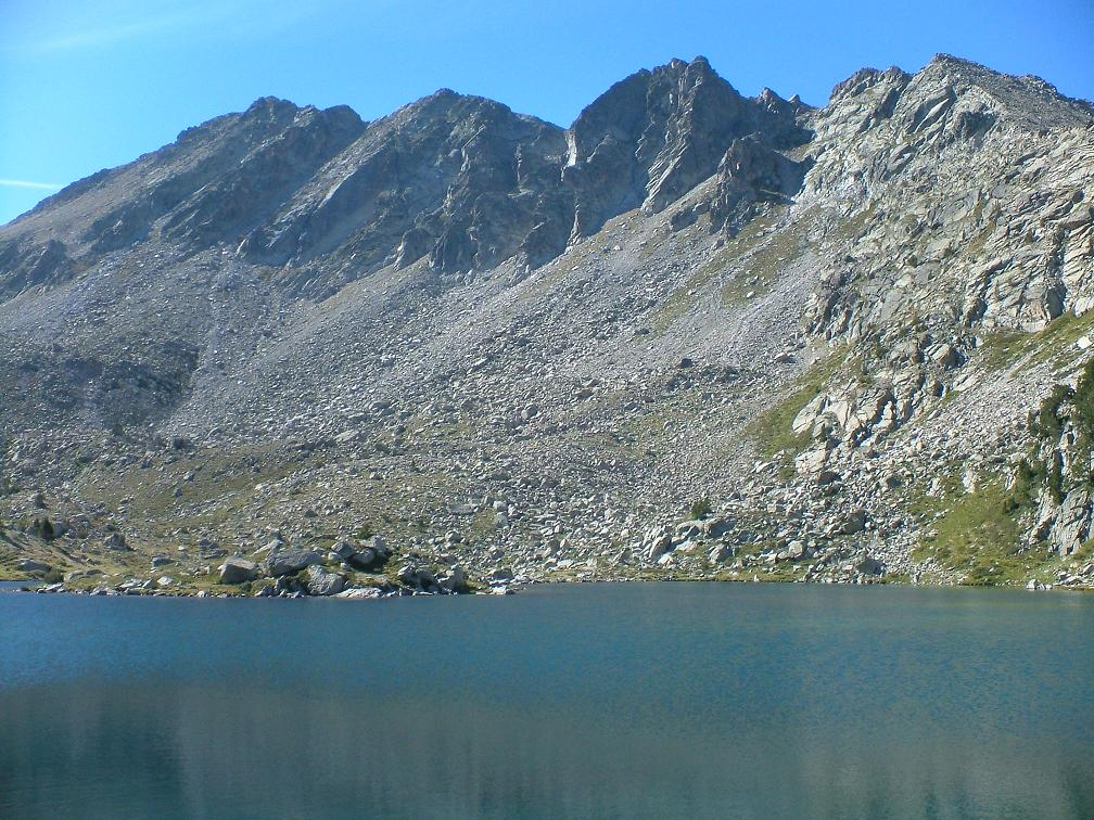 Pic de Dellui vist des de l'Estany de Dellui; la Vall de Boí, Alta Ribagorça, Catalunya